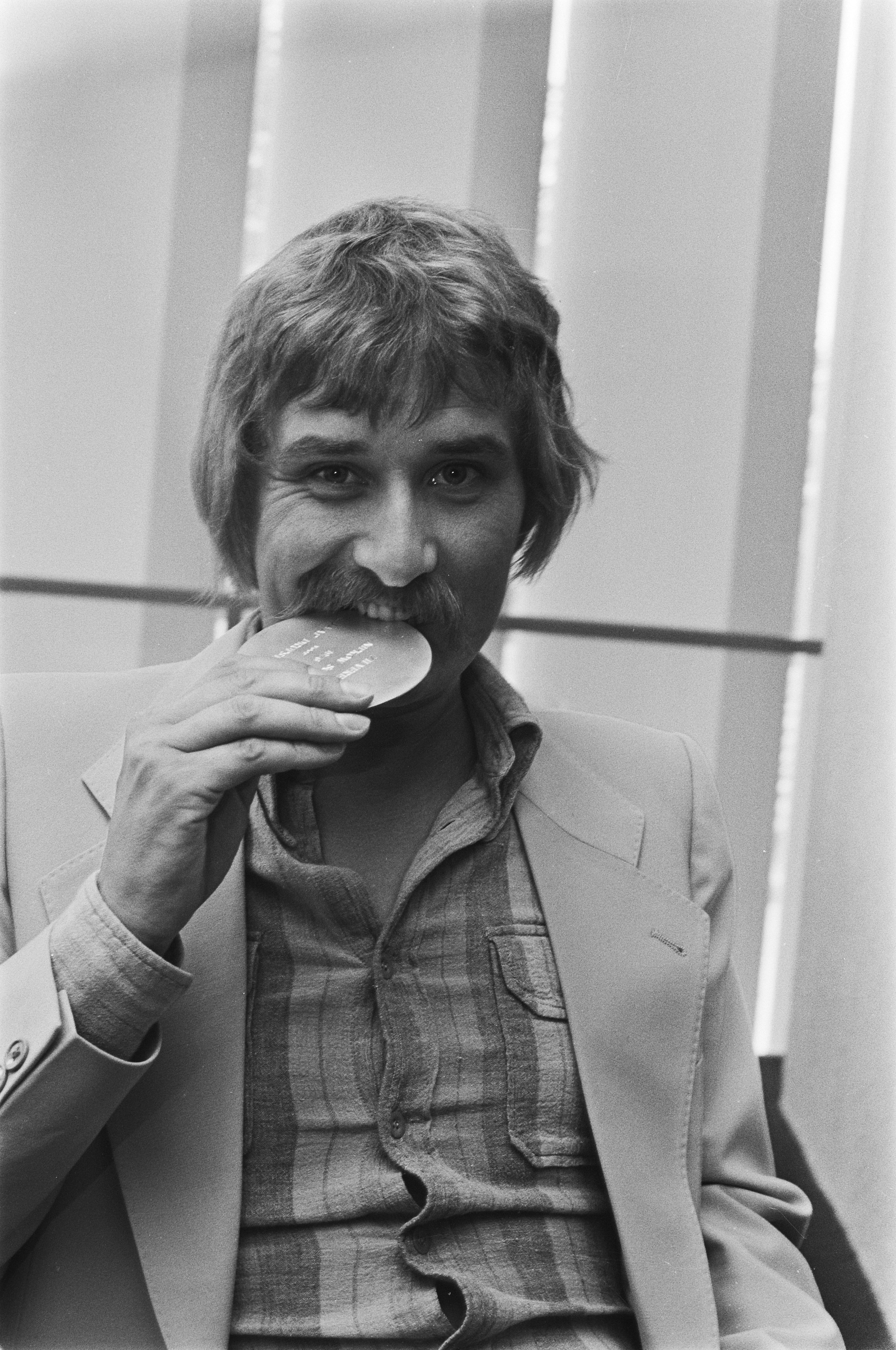 Collectie / Archief : Fotocollectie Anefo Reportage / Serie : [ onbekend ] Beschrijving : Nipkowschijf voor VPRO-medewerker Jaap Drupsteen Datum : 27 augustus 1976 Persoonsnaam : Drupsteen, Jaap Fotograaf : Bogaerts, Rob / Anefo Auteursrechthebbende : Nationaal Archief Materiaalsoort : Negatief (zwart/wit) Nummer archiefinventaris : bekijk toegang 2.24.01.05 Bestanddeelnummer : 928-7492